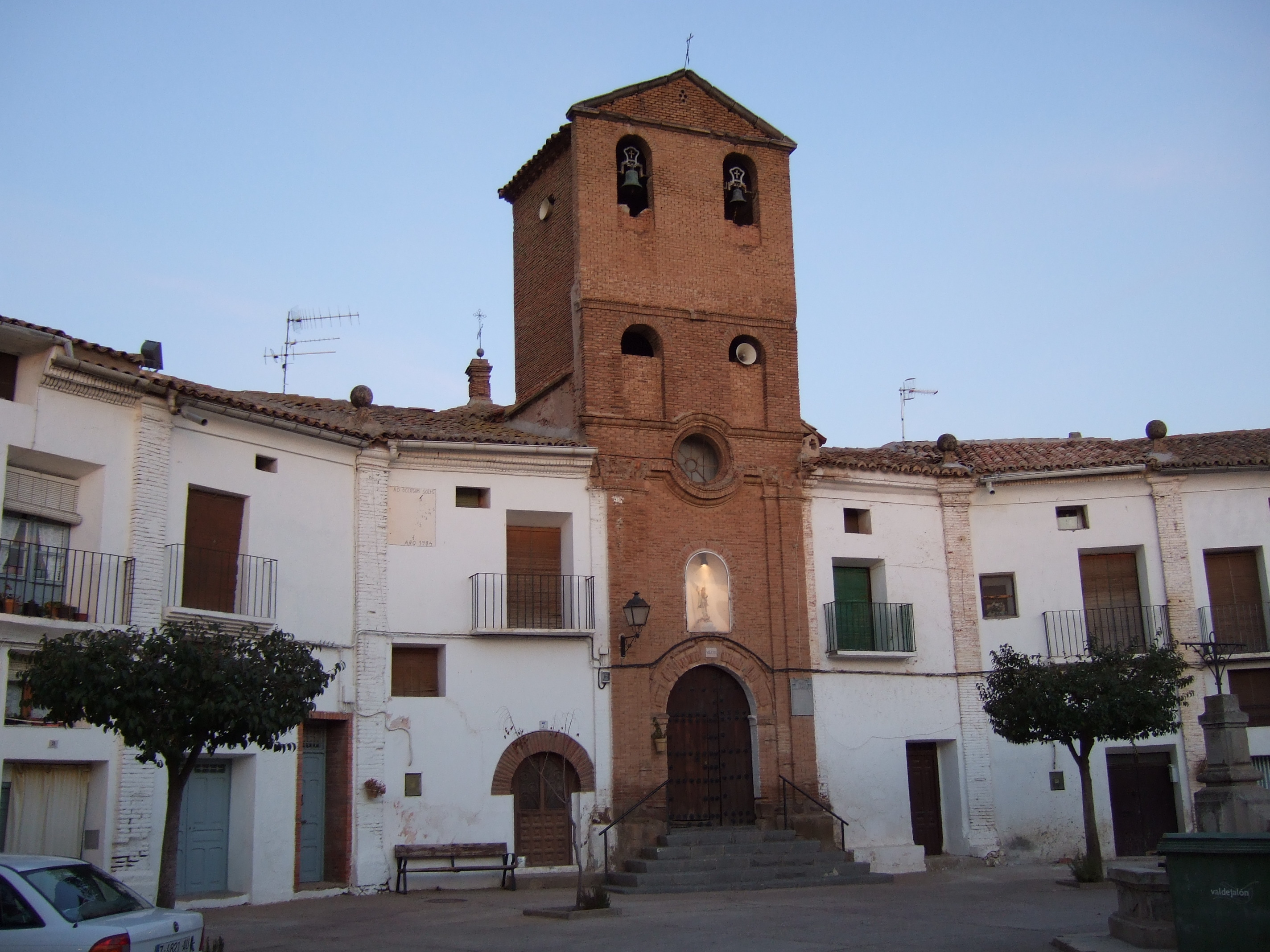 Chodes - Plaza ochavada, planificada a finales del siglo XVII por Juan de Marca